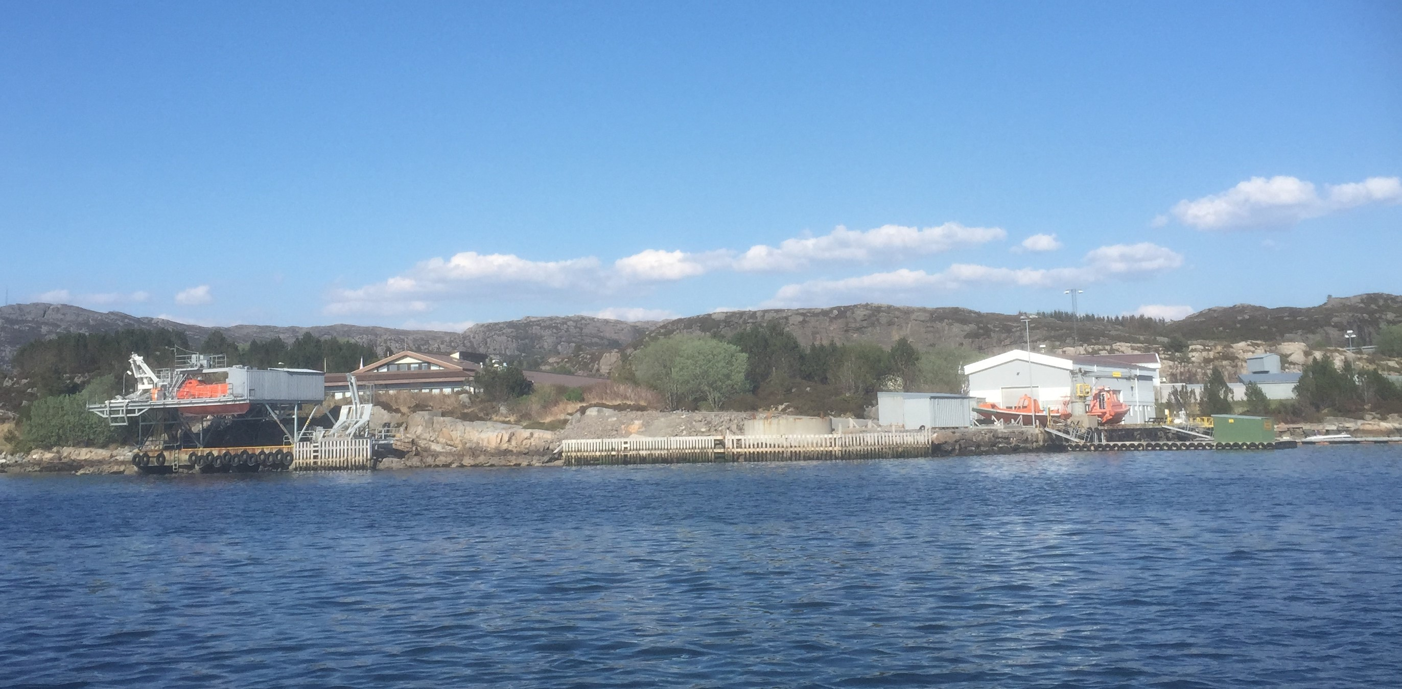 Sikkerhetssenteret til Falck Nutec i Sund